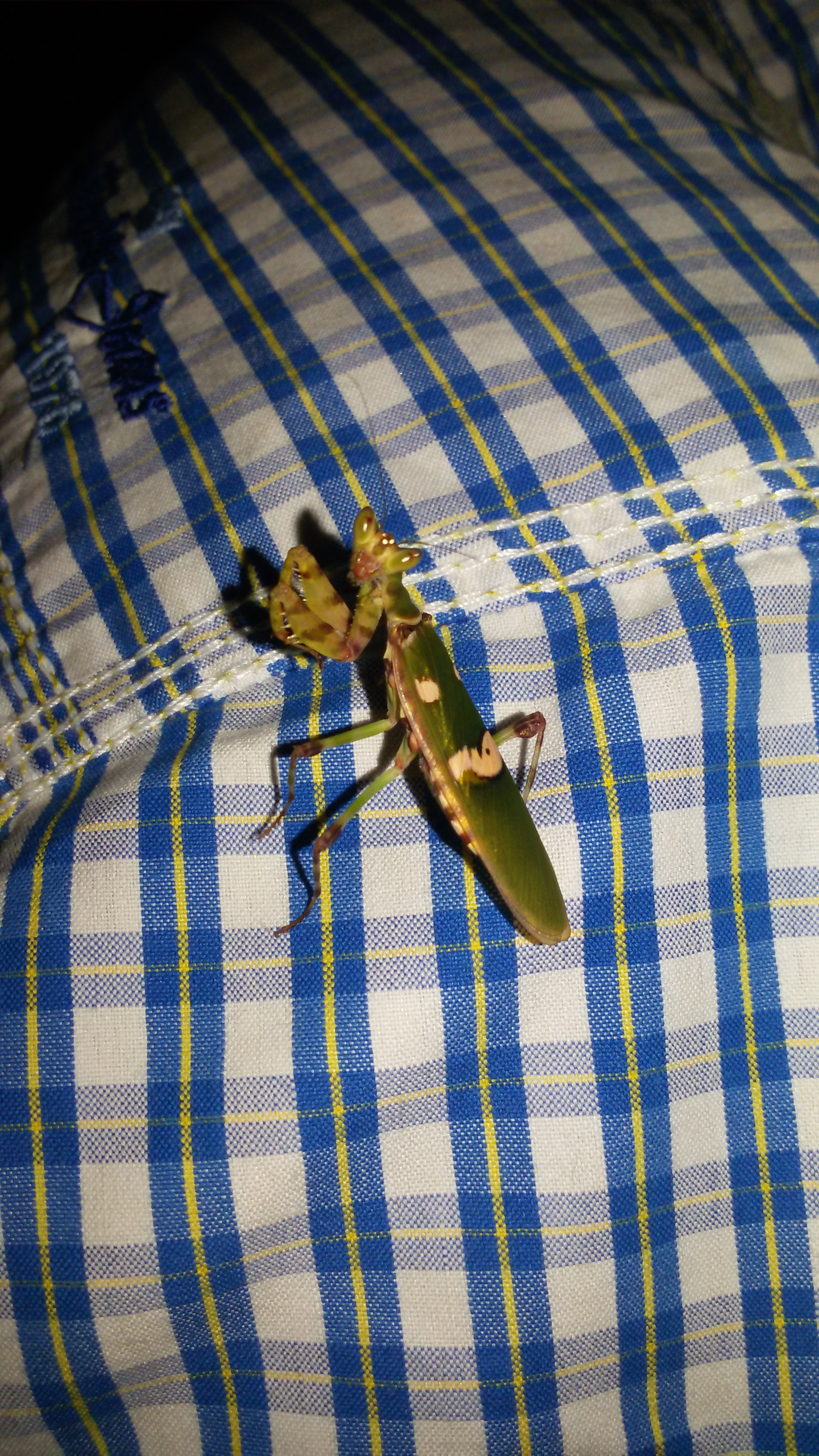 പച്ചത്തുള്ളൻ